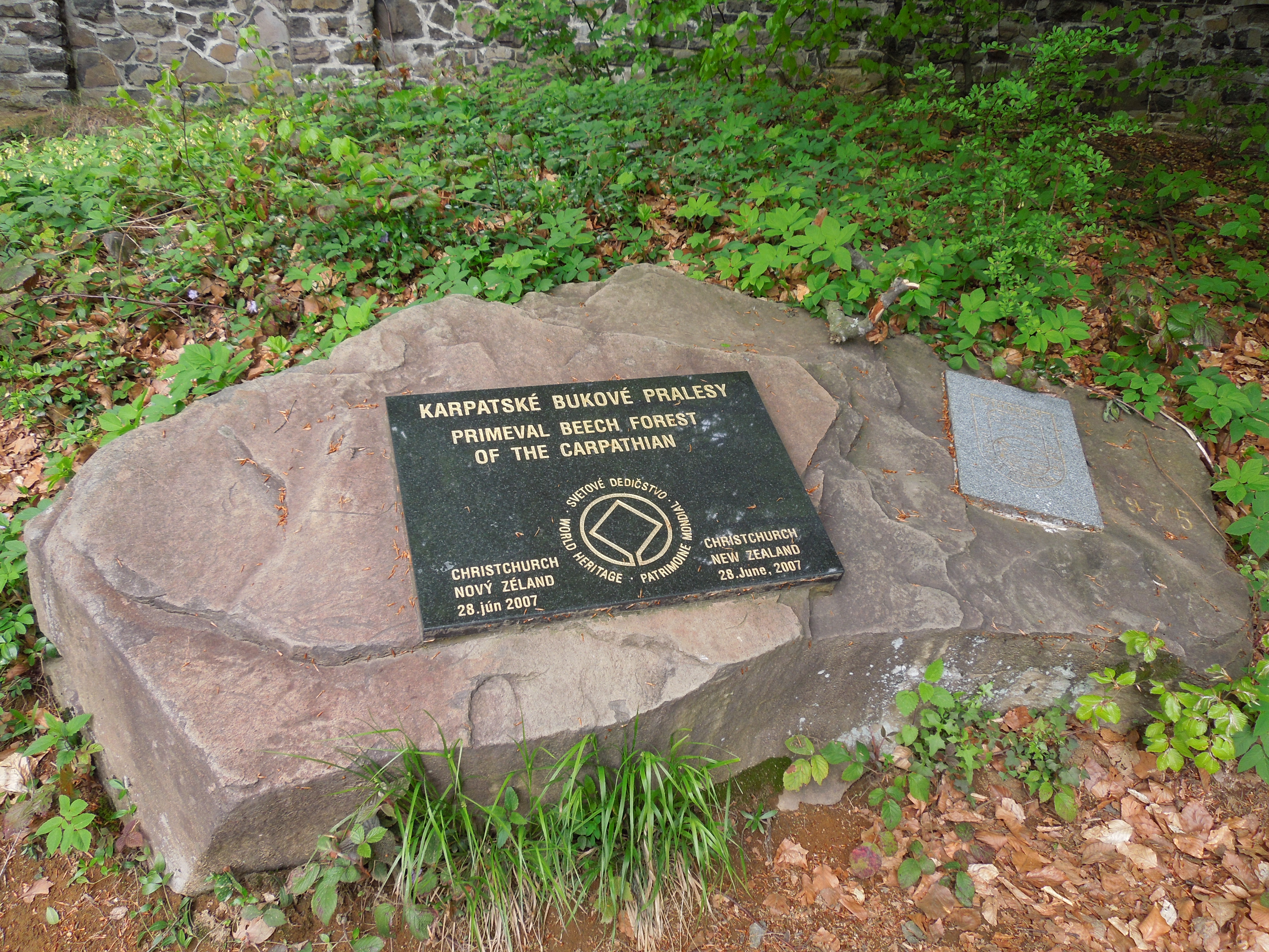 Pamätná tabuľa v lokalite Svetového dedičstva UNESCO vo Vihorlatských vrchoch, neďaleko brehu jazera Morské oko